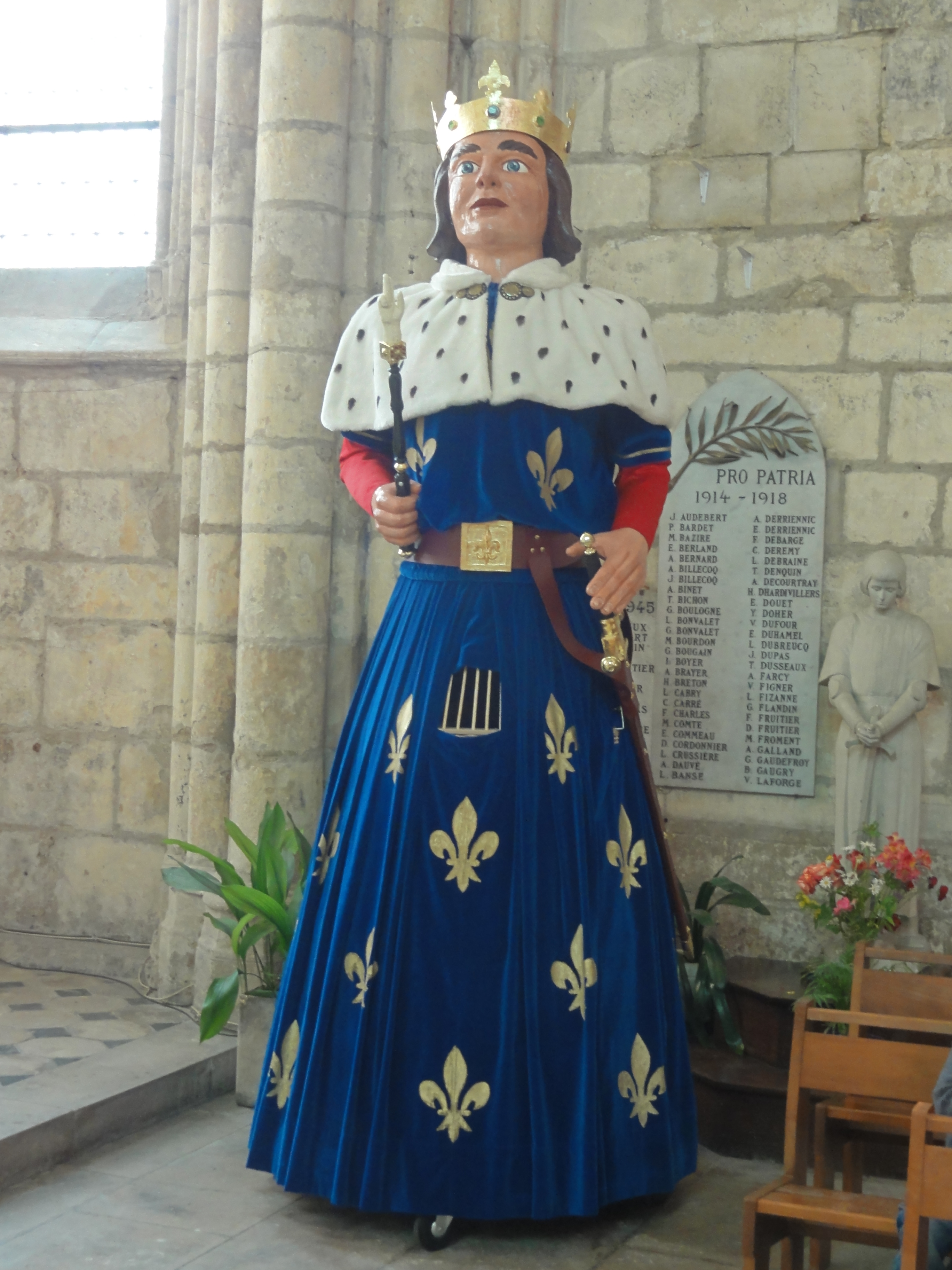 Géant de carnaval - saint Louis.